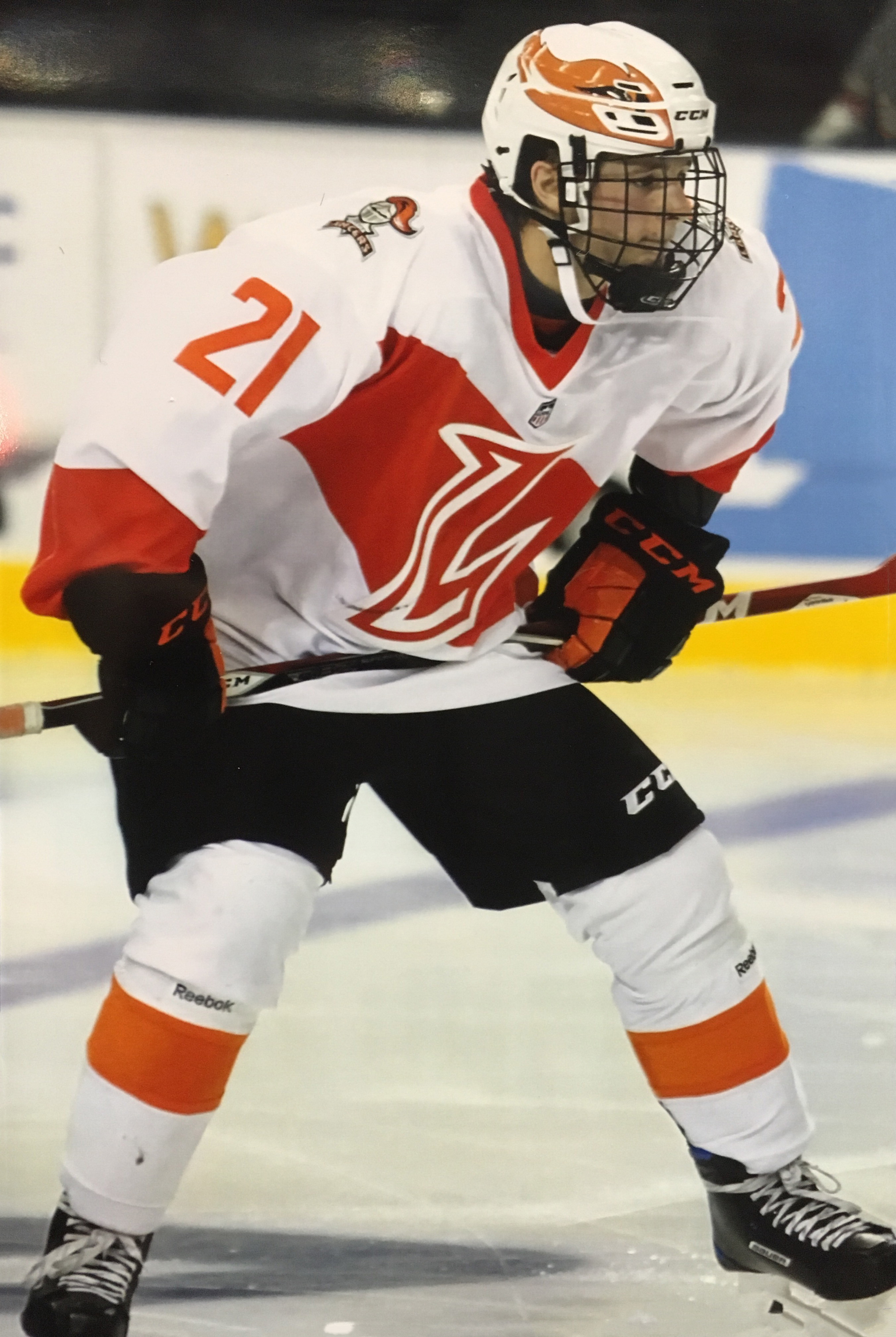 Mathias Emilio Pettersen Omaha Lancers #21